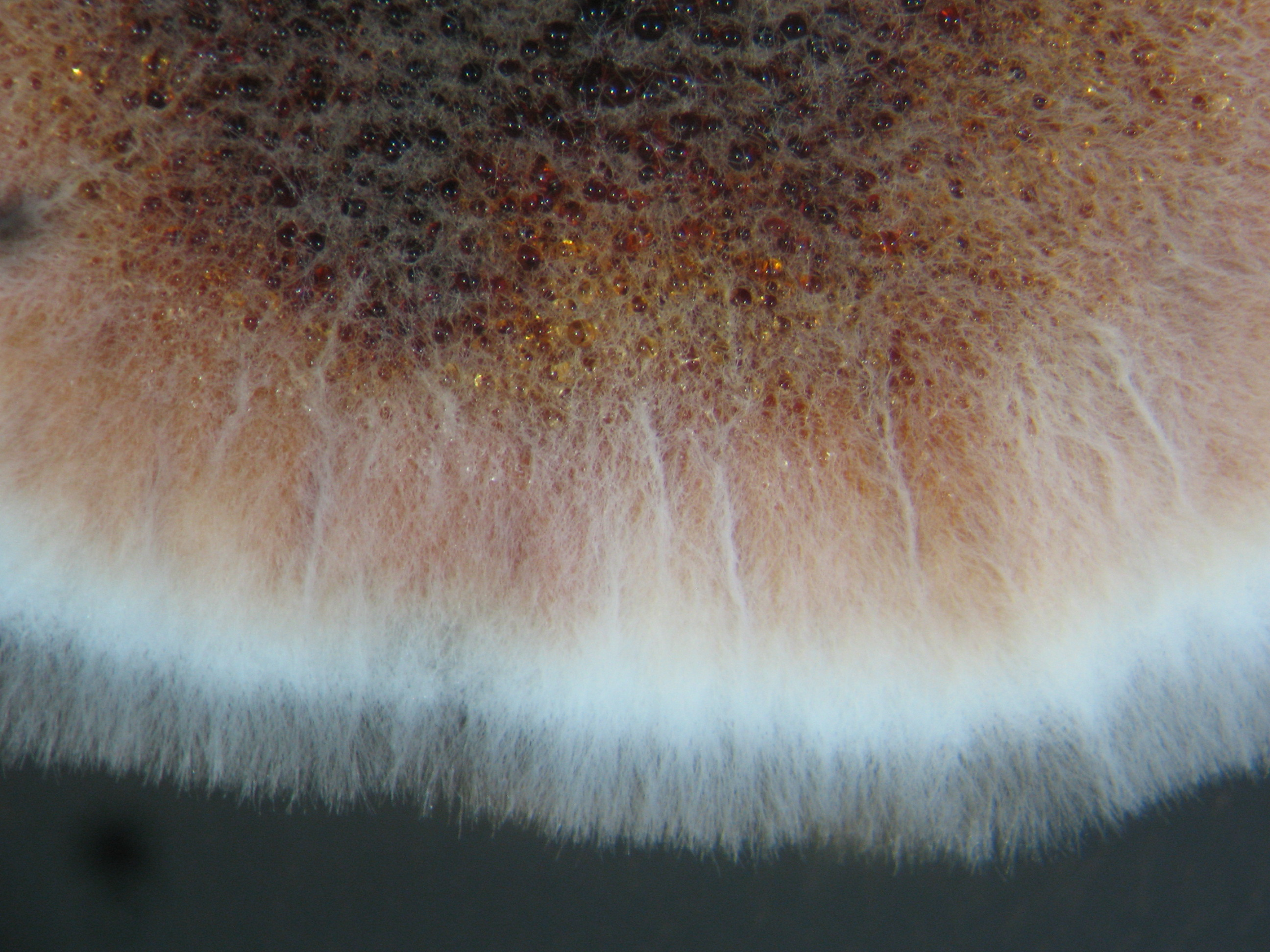 Armillaria spp. micēlija krāsas maiņa augot uz iesala agara barotnes.